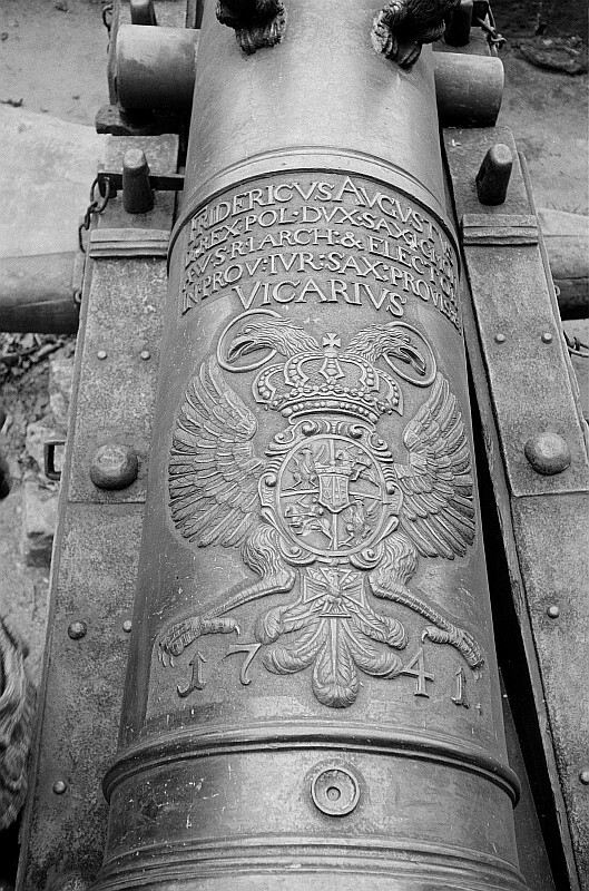 Original image description from the Deutsche Fotothek Geschützrohr mit gekröntem polnisch-sächsischen Wappen